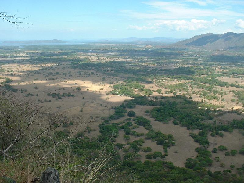 Vista del golfo de Nicoya desde el mirador, Parque Nacional Barra Honda, Costa Rica.